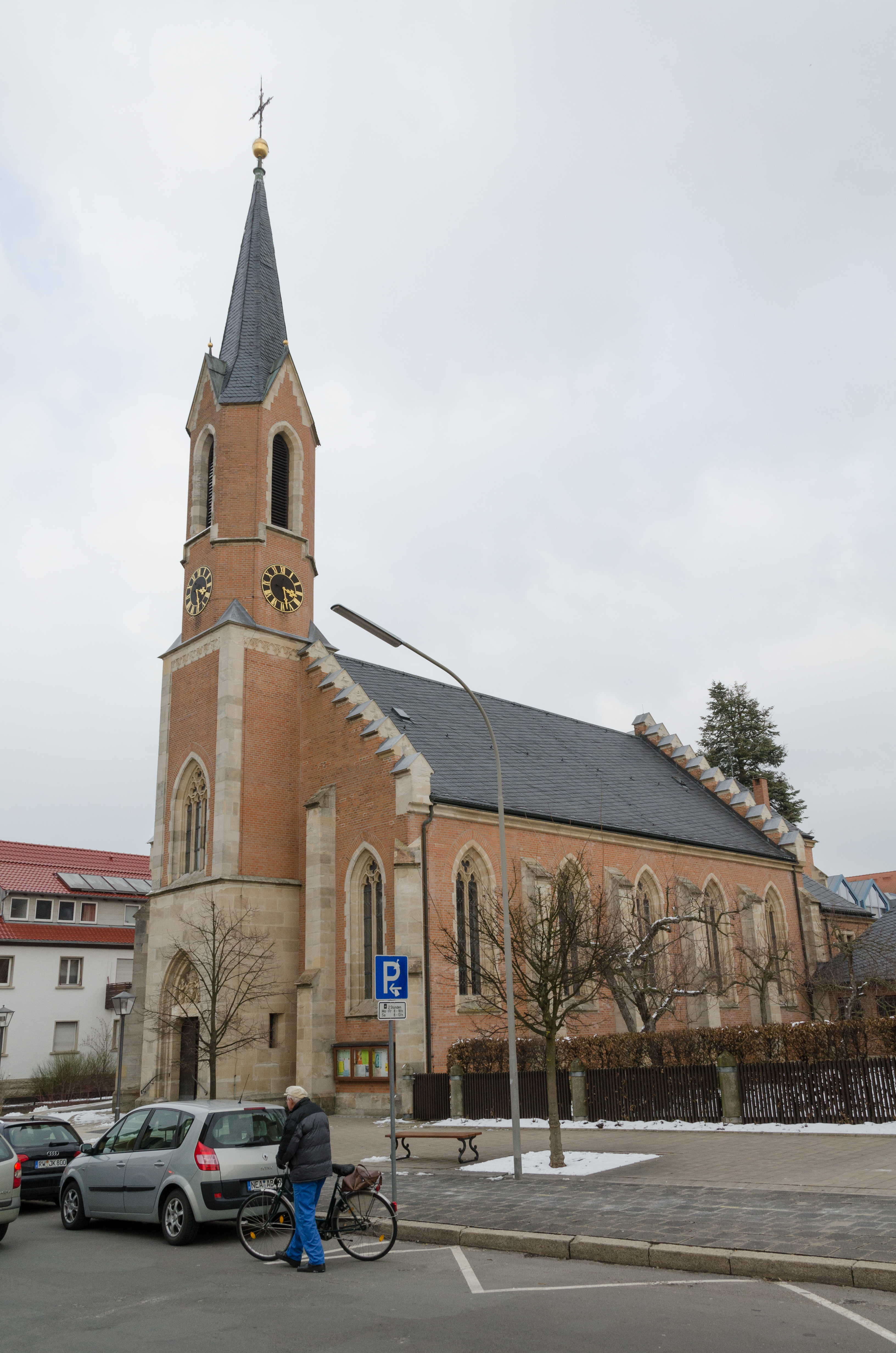 Neustadt an der Aisch, kath. Pfarrkirche